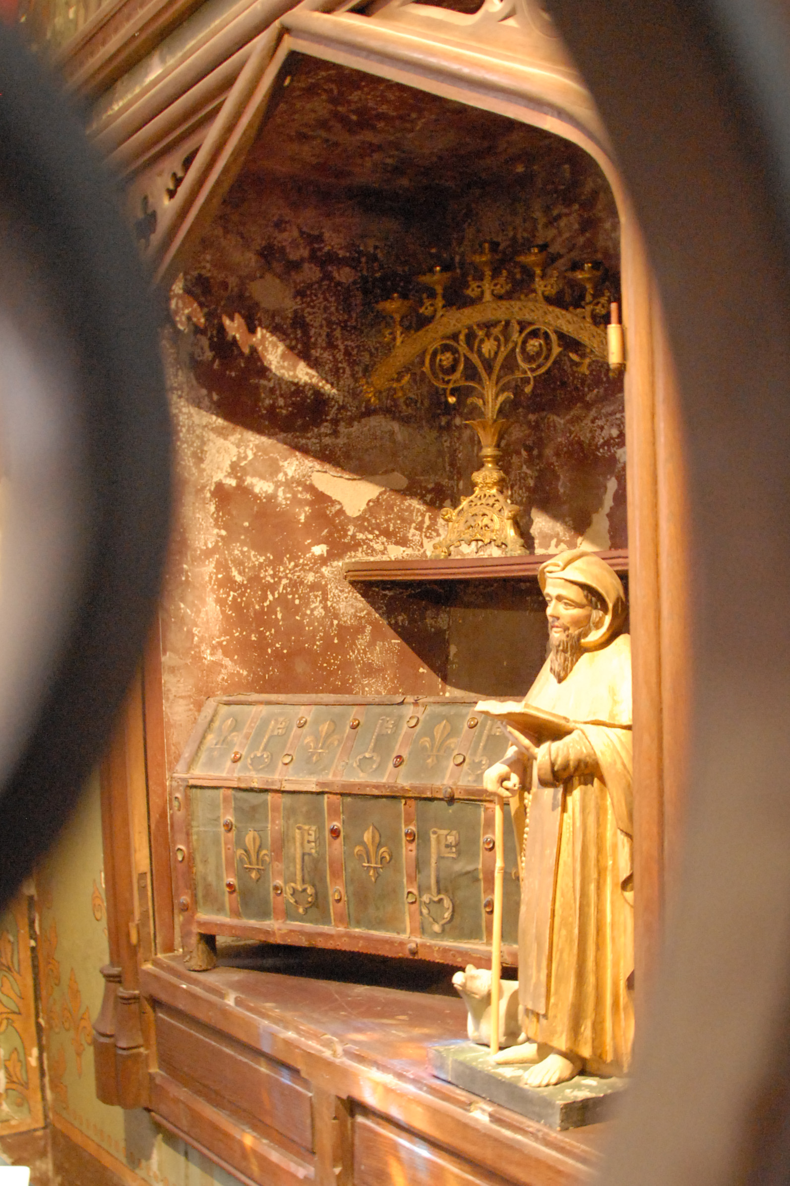 Mozac, noch ein Reliquienschrein